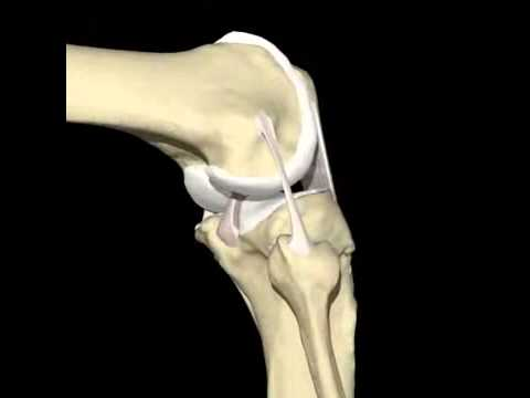 Kelio sąnario sandara